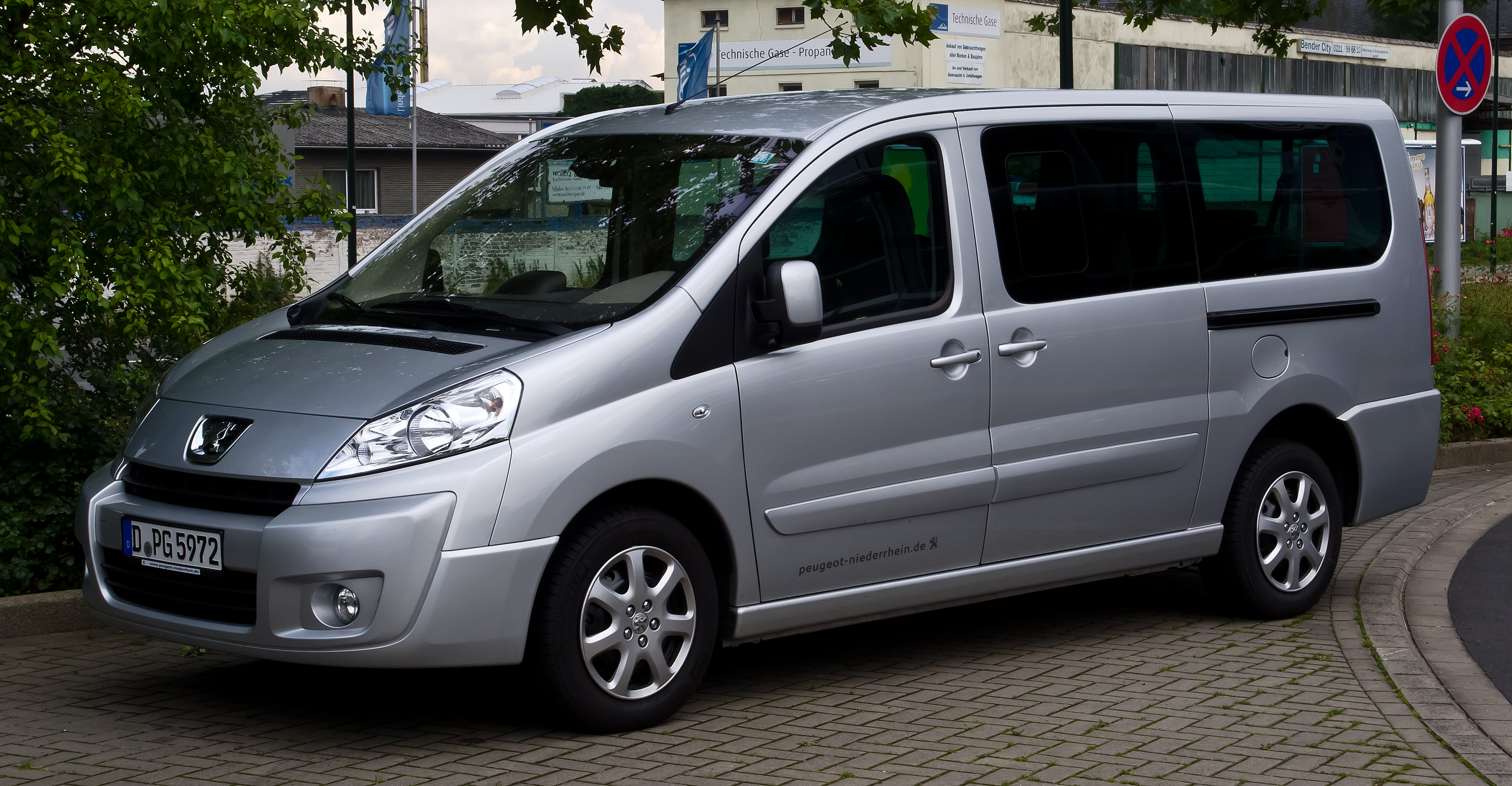 Peugeot Expert Tepee (II)